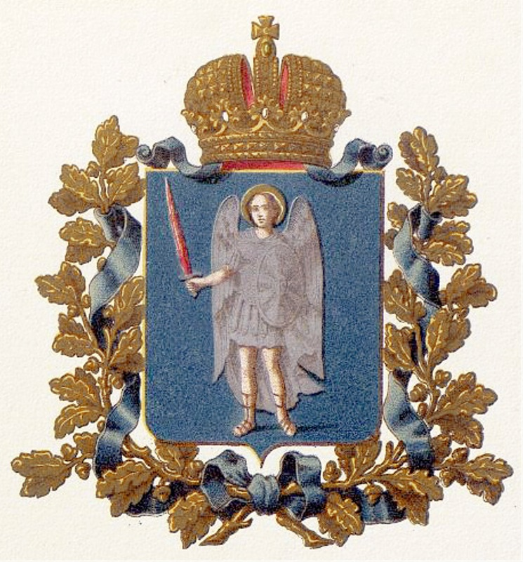 Official Russian Empire coat of arms Kiev Governorate. Герб Российской Империи Киевской губернии в Гербовнике Министерства внутренних дел Российской Империи. Утверждён Императором Всероссийским Александром Вторым.